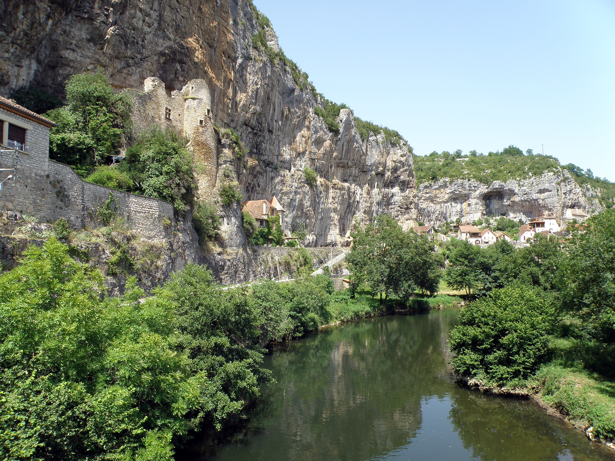 Cabrerets, commune et village dans le département du Lot (région Midi-Pyrénées, France), situés sur le Célé, affluent droit du Lot, à une vingtaine de km (à vol d’oiseau) à l’est-nord-est de Cahors. La rivière Célé, avec à gauche ruines du château troglodyte dit des Anglais ou du Diable, adossé à la falaise de Rochecourbe, sur la rive droite de la rivière, à peu de distance en amont du village.